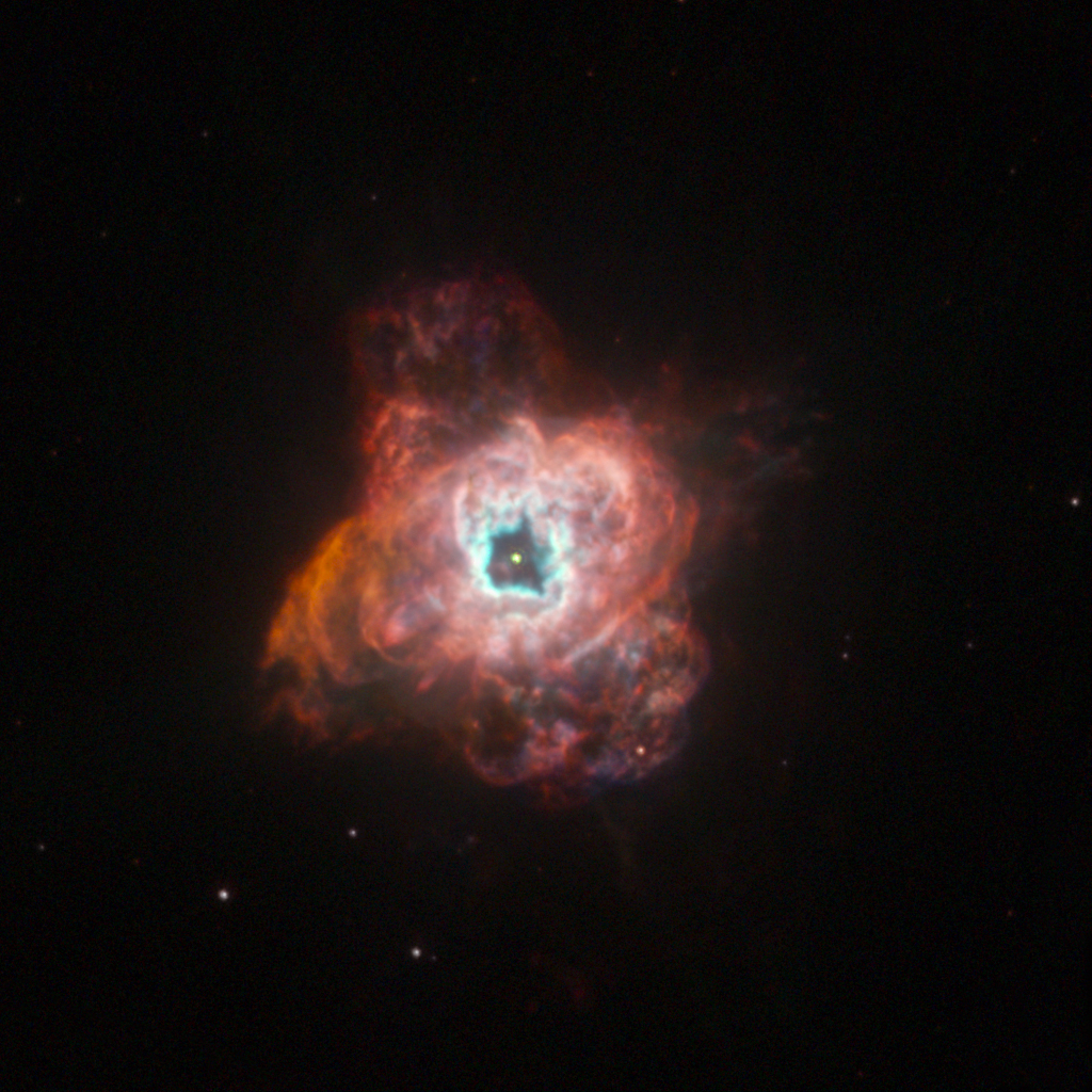 NGC 5315